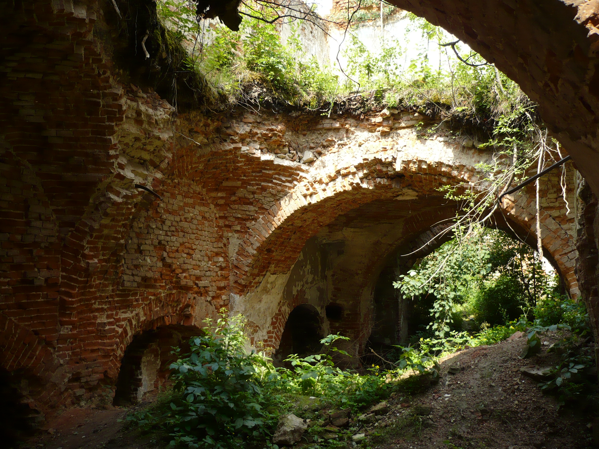 Starym Sioło - zamek księcia Zasławskiego, sklepienia przyziemia.